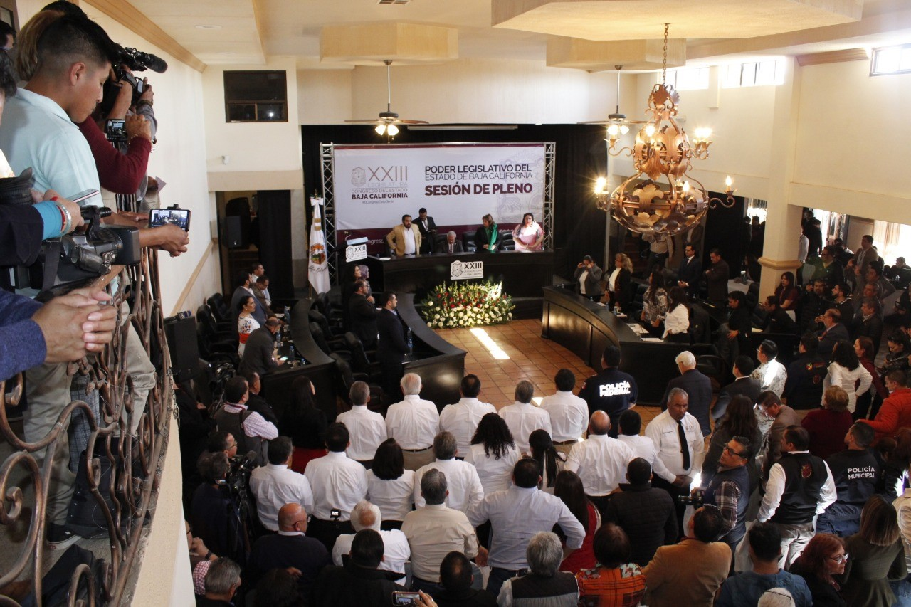 Congreso del Estado de Baja California aprueba la creación del Municipio de San Quintín.